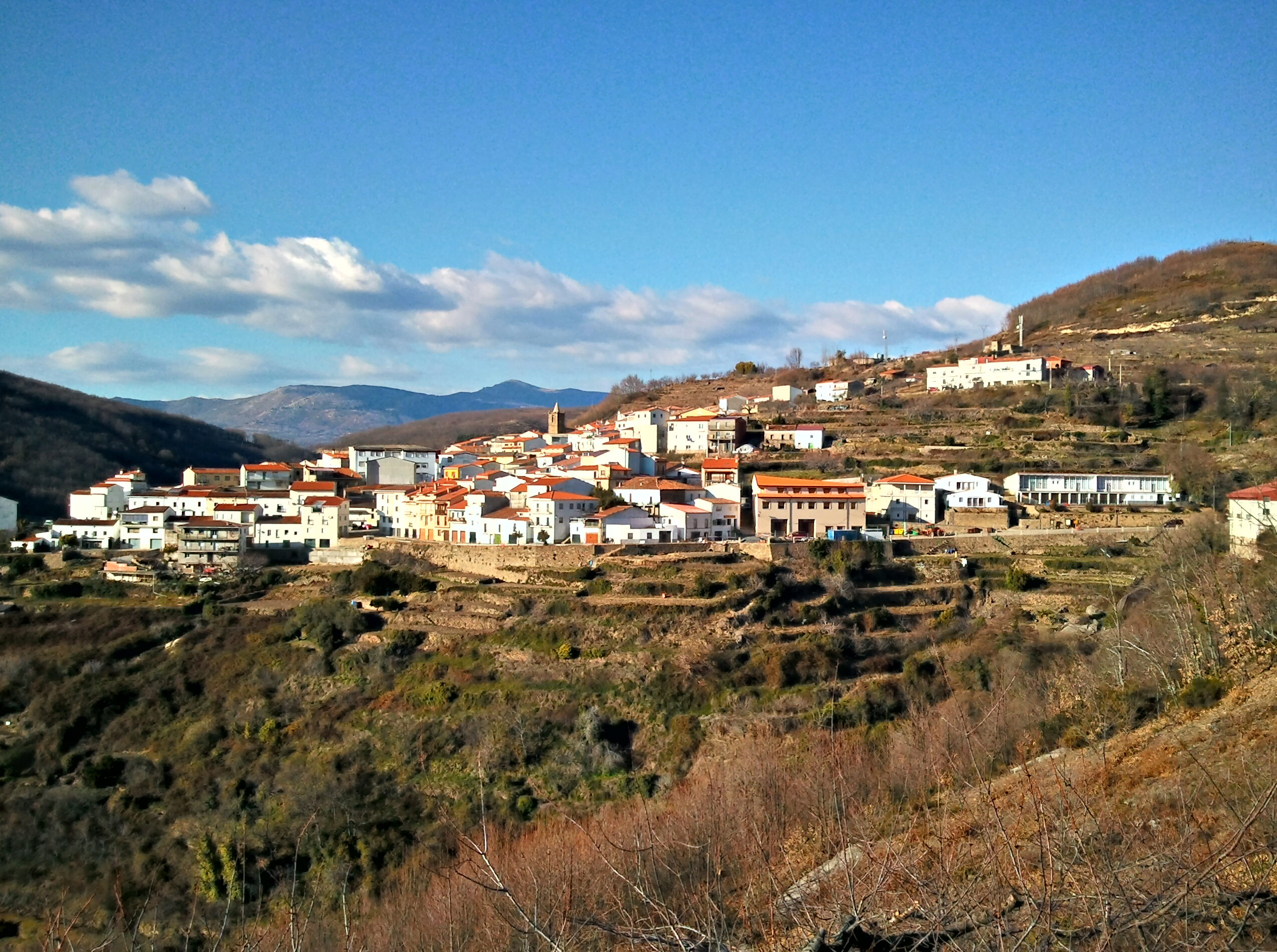 Foto de Barrado desde la Fuente de los Chaparejos en febrero de 2012